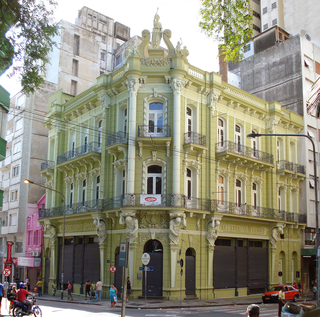 Confeitaria Rocco, um prédio histórico de Porto Alegre, Brasil.